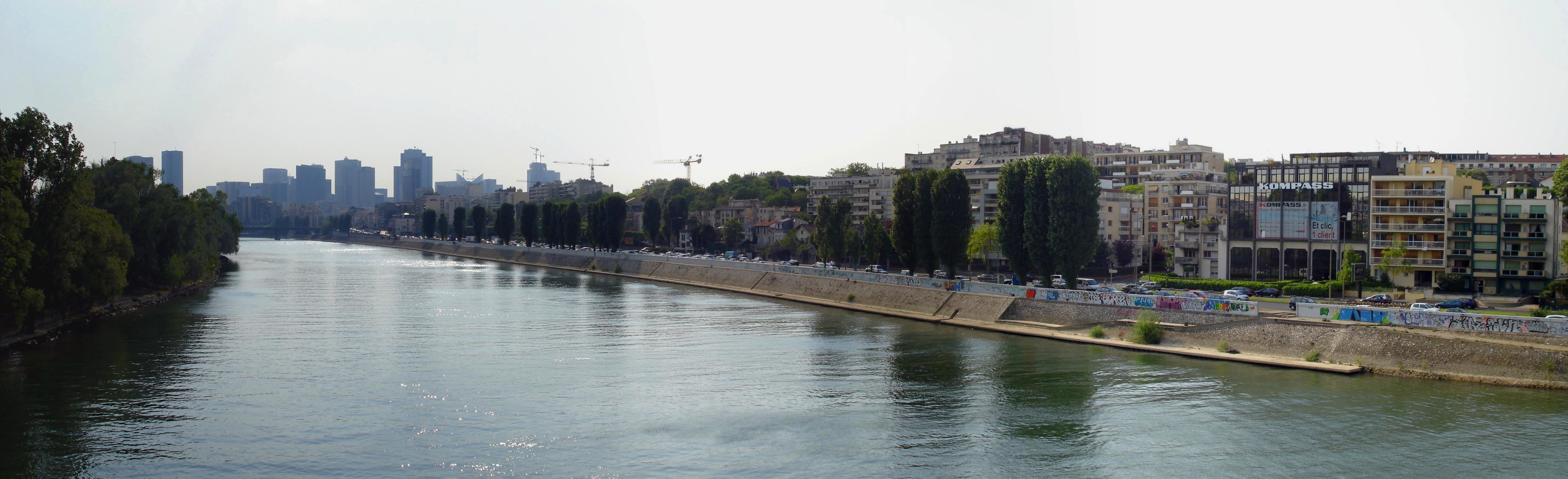 à droite: Les Quais de Seine à Courbevoie, à gauche Île de la Grande Jatte, Levallois-Perret, au fond quartier de La Défense, (Hauts-de-Seine), France